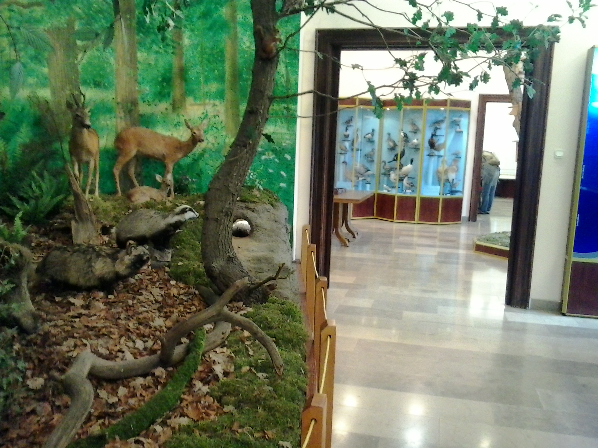 Dyrekcja i Muzeum Wielkopolskiego Parku Narodowego w Jeziorach.